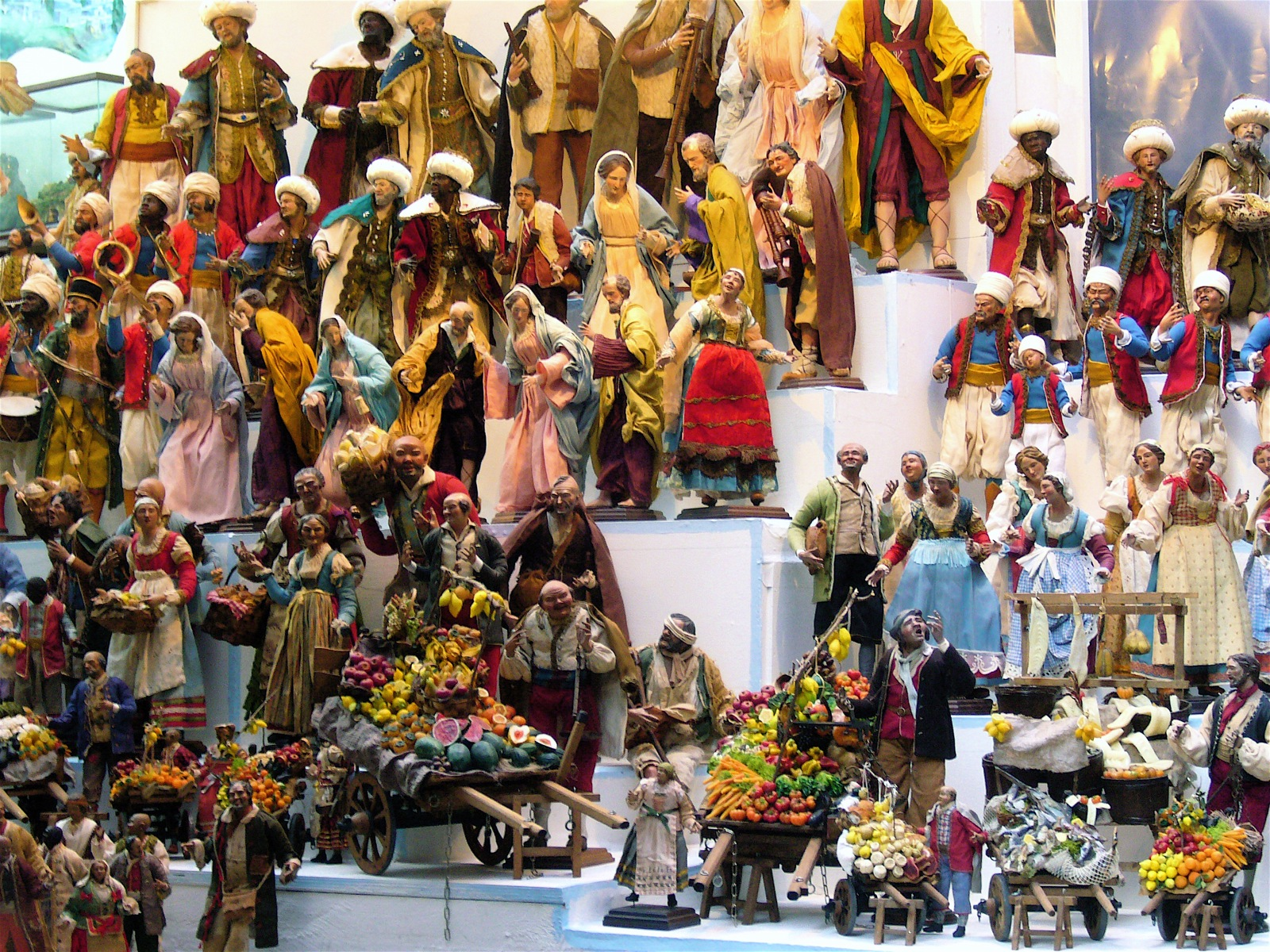 Un'intera strada dedicata ai pastori e ai presepi - Via San Gregorio Armeno, nel centro storico, Napoli - Italia.